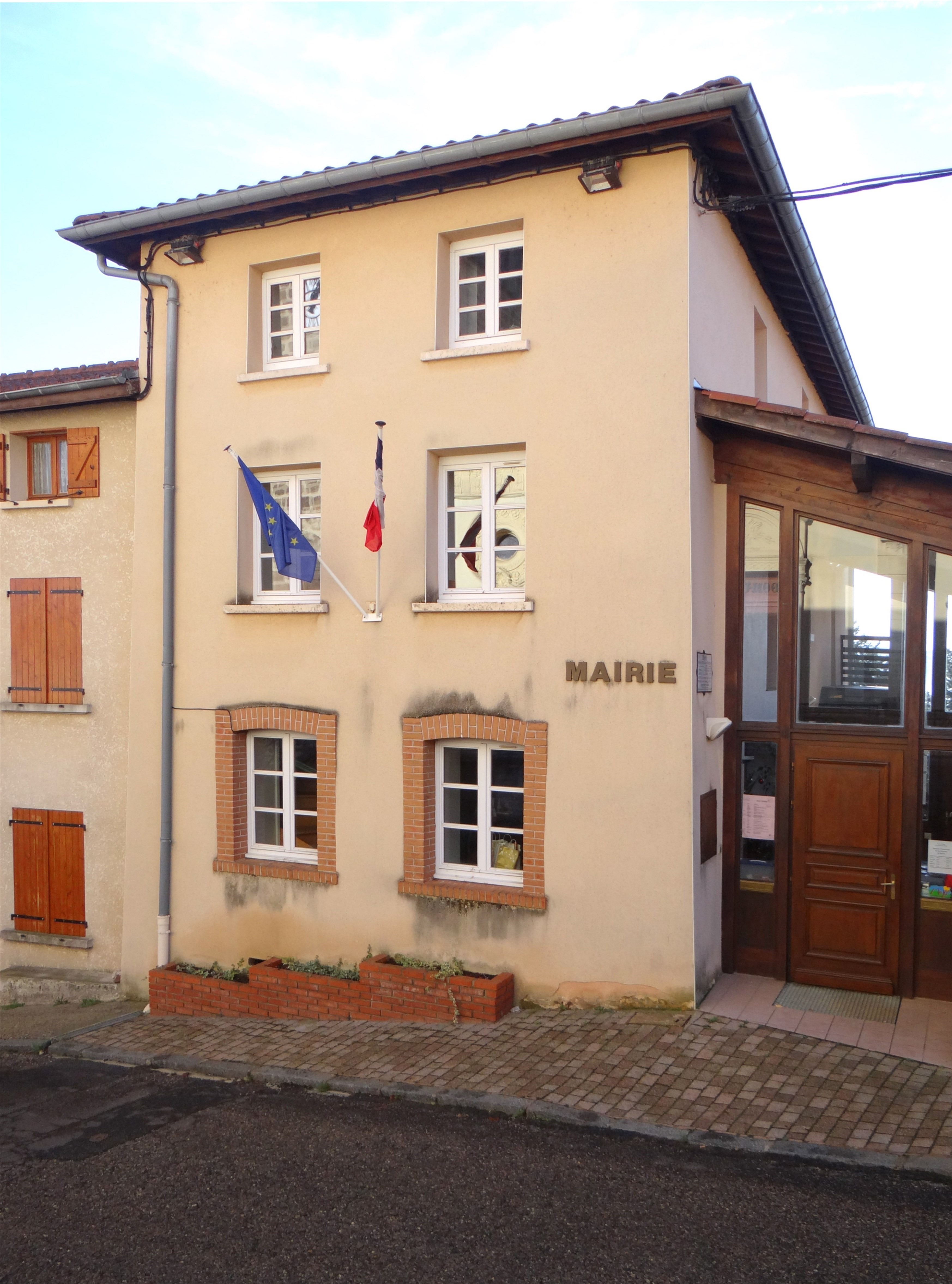 Mairie de Meys, Rhône,France.